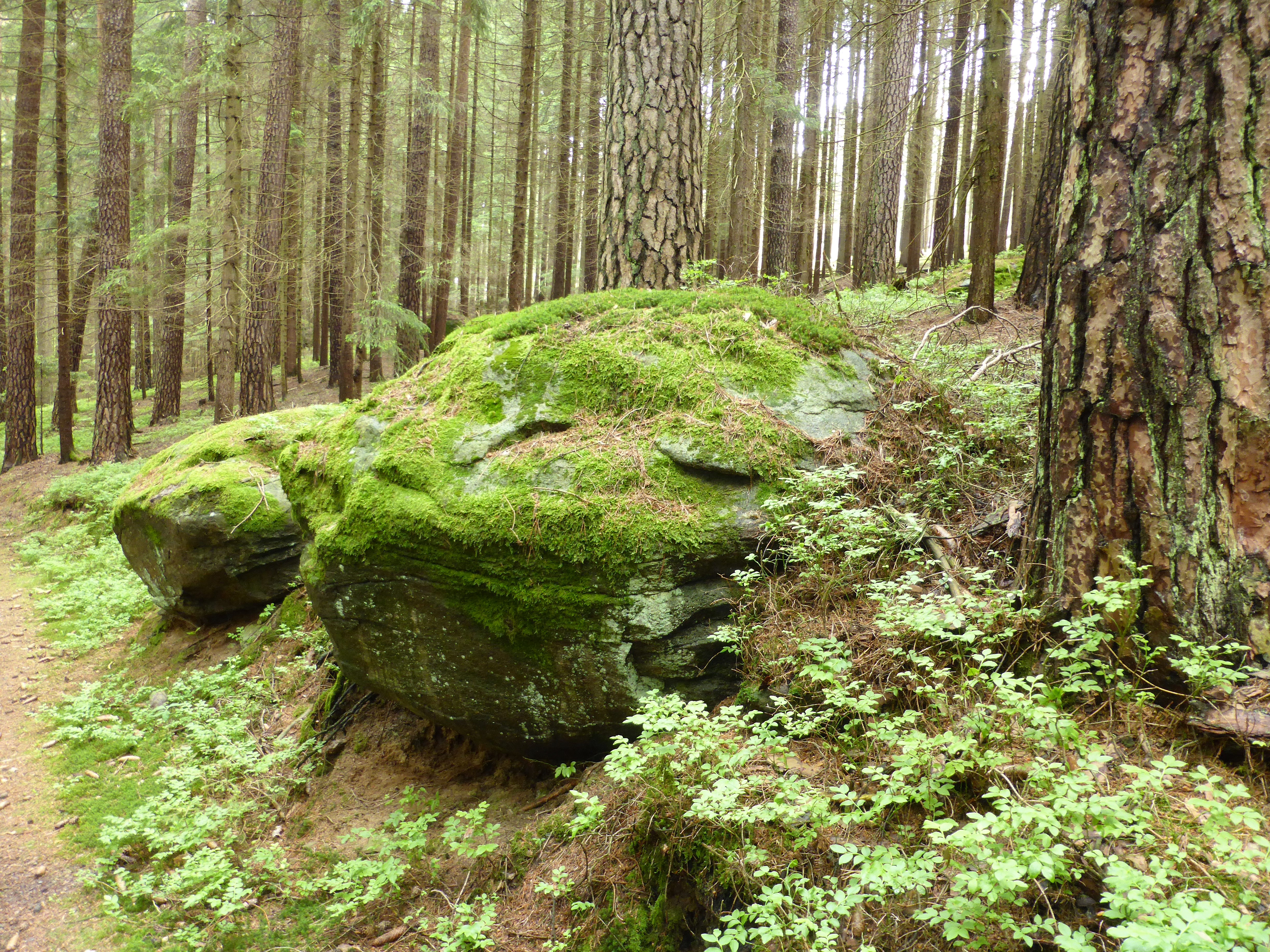 Felsblöcke im Kerbtal des Schwarzen Regens im Landkreis Regen. Geotop.